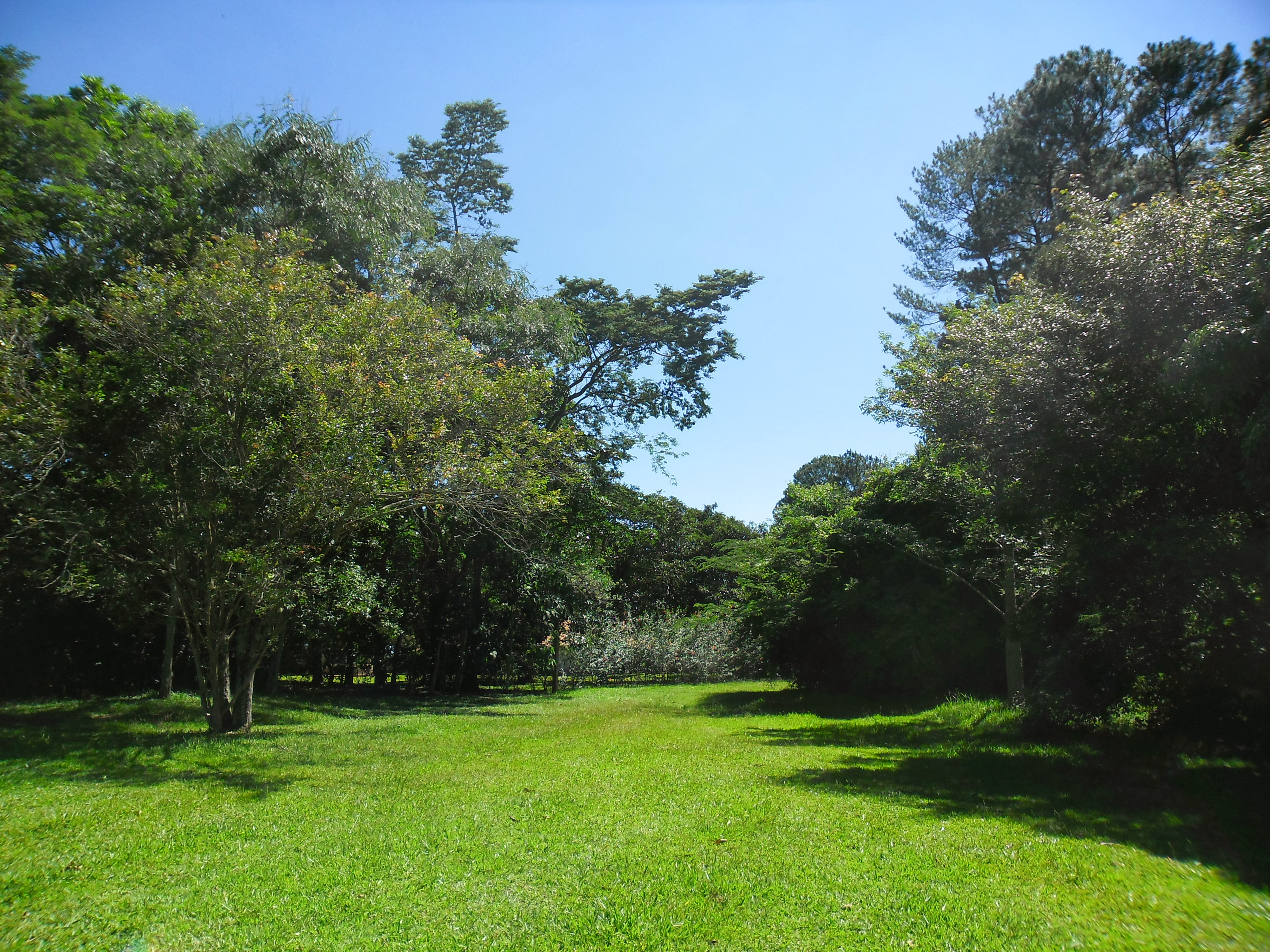 Parque Estadual de Porto Ferreira